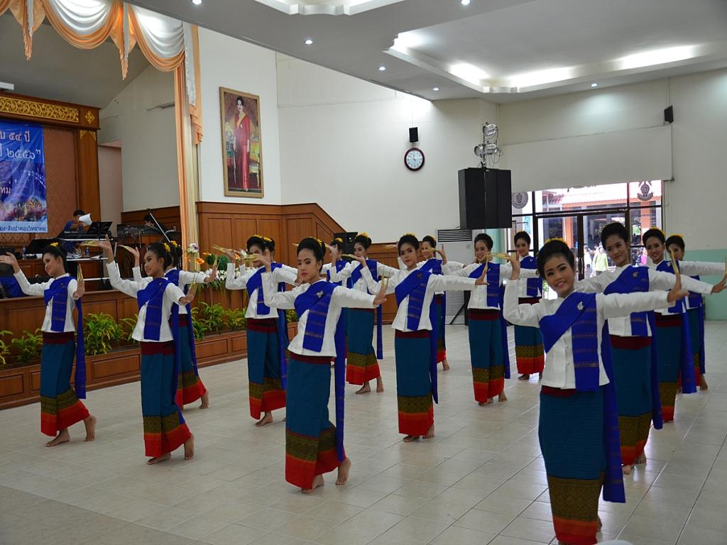 สถาปนา ส.ว. 2